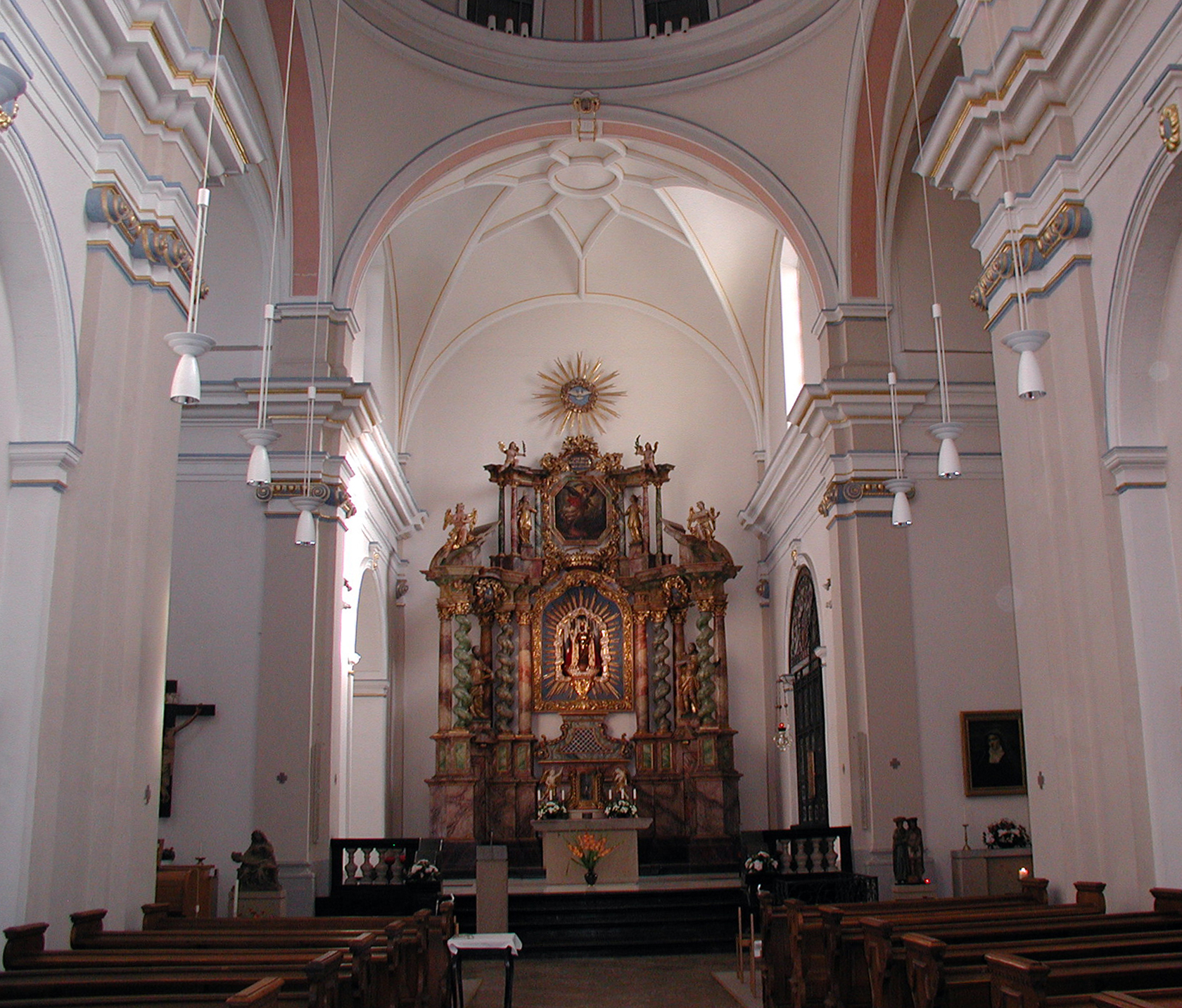 St. Maria vom Frieden, Köln